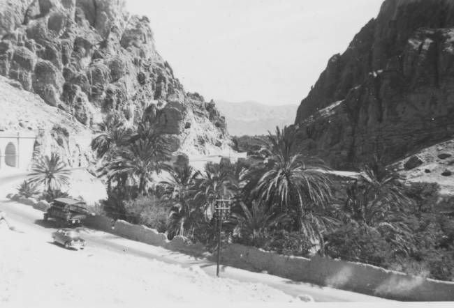 Photo prise à El Kantara le 14 avril 1962.